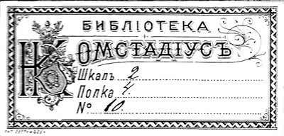 Экслибрис Николая Николаевича Комстадиуса.